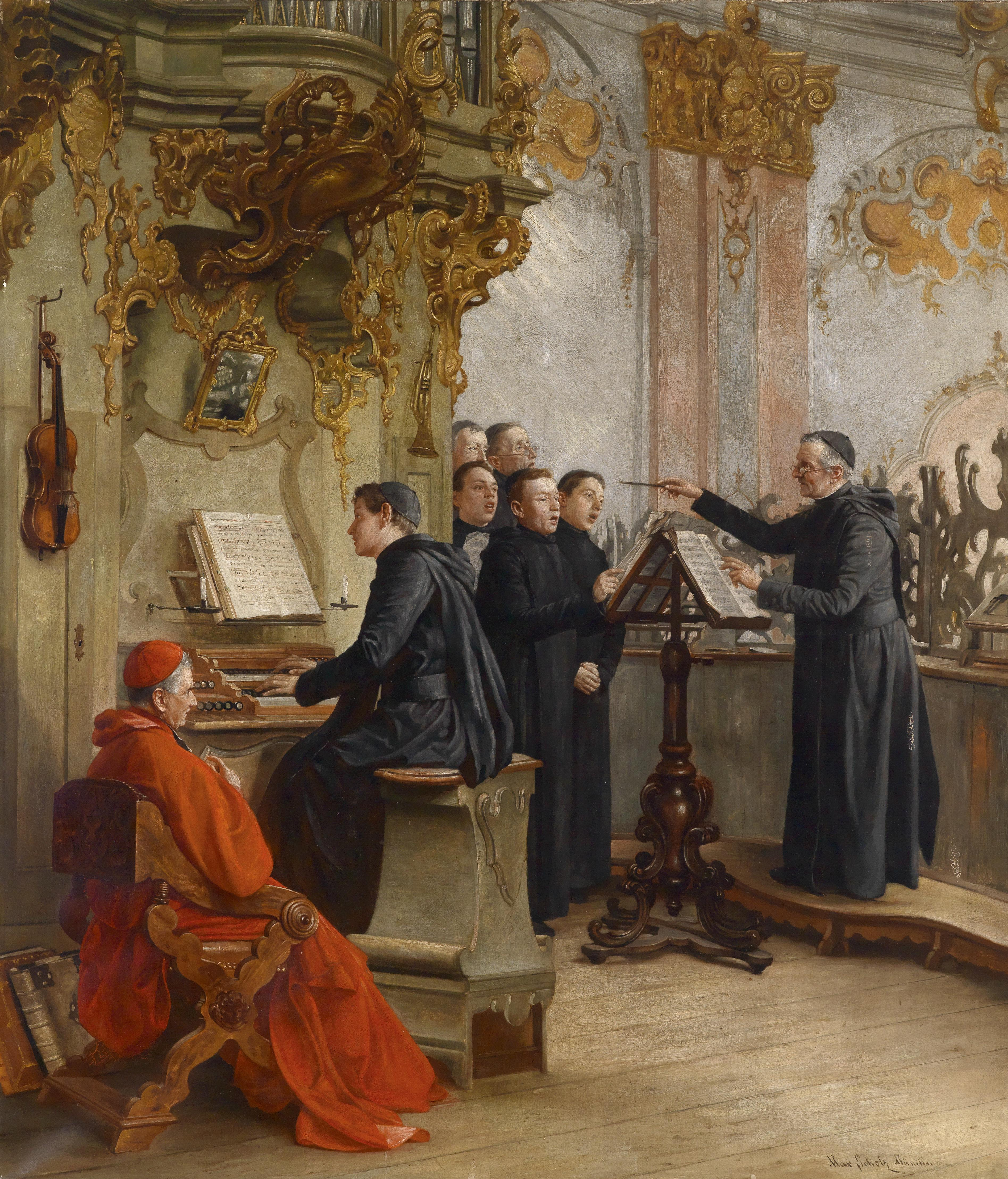 Chorkonzert, signiert und bezeichnet Max Scholz München, Öl auf Leinwand, 101 x 87 cm